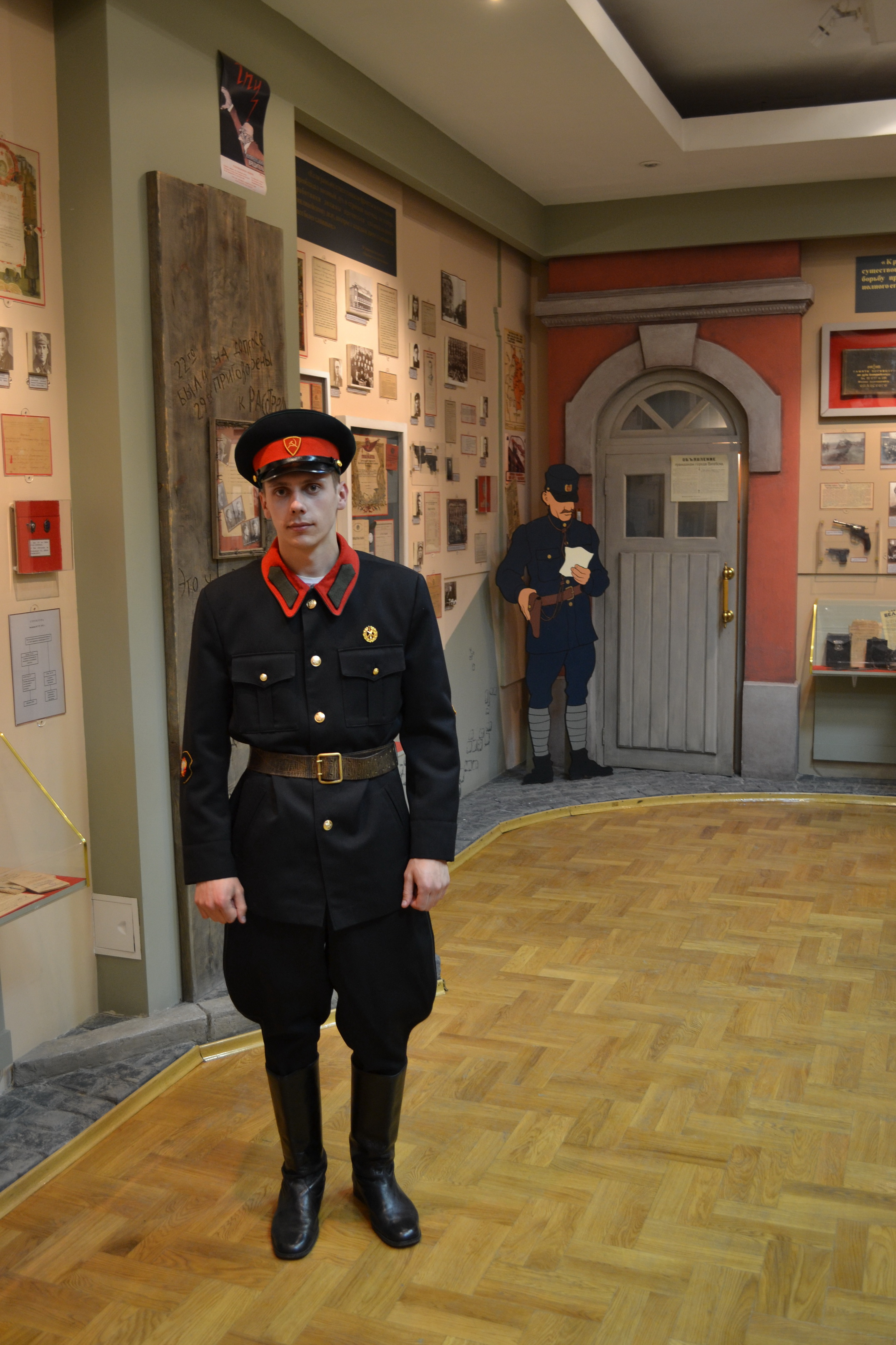 Беларуская (тарашкевіца): Вікісустрэча ў Менску 17 траўня 2014